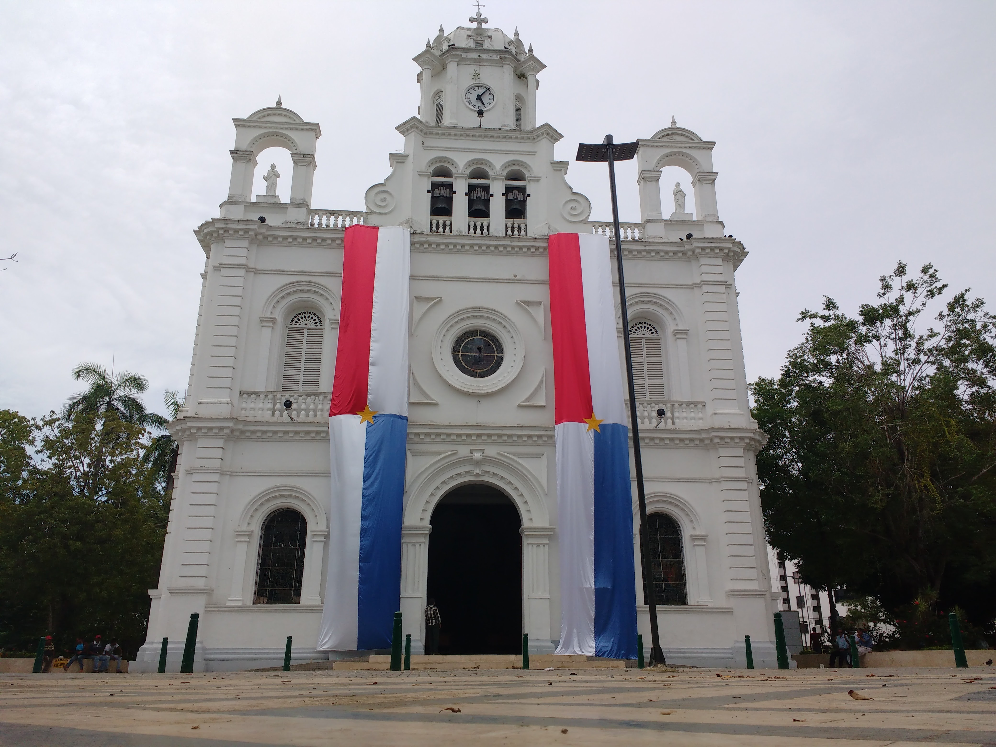 La catedral de la ciudad adornada con la bandera de la misma en la celebración de sus 240 años de fundación.